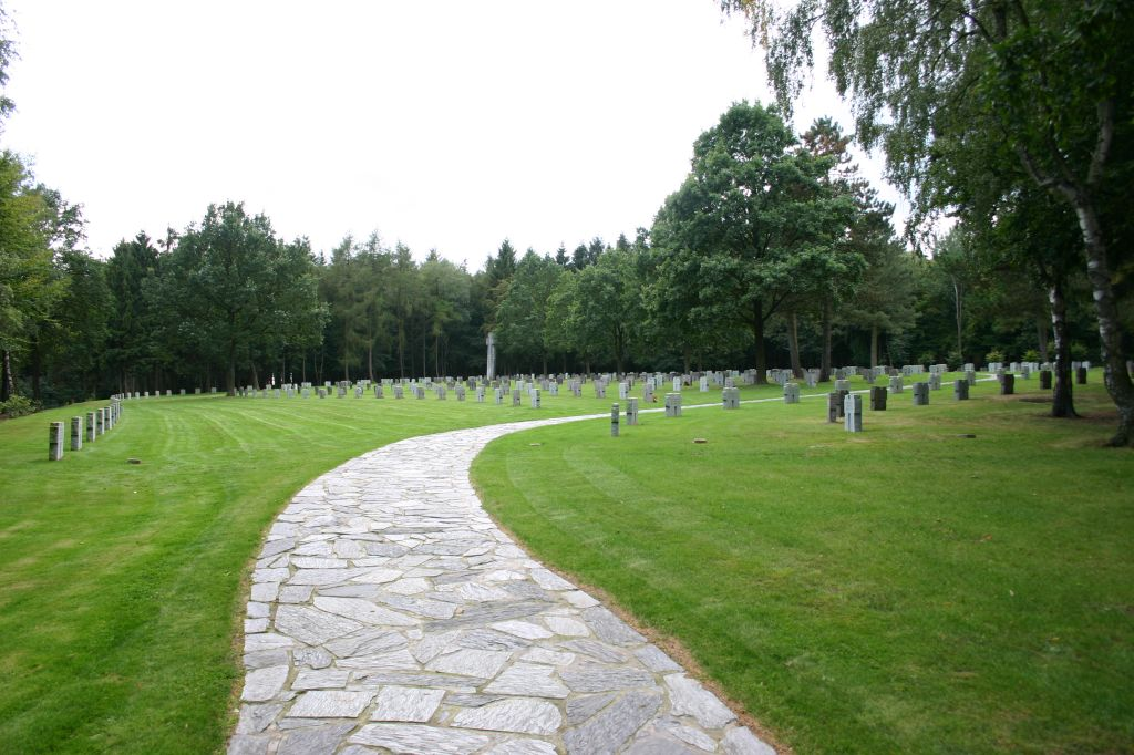 Ehrenfriedhof Hürtgen, Hürtgenwald, Eifel